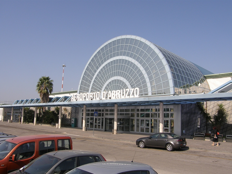 Pescara Airport